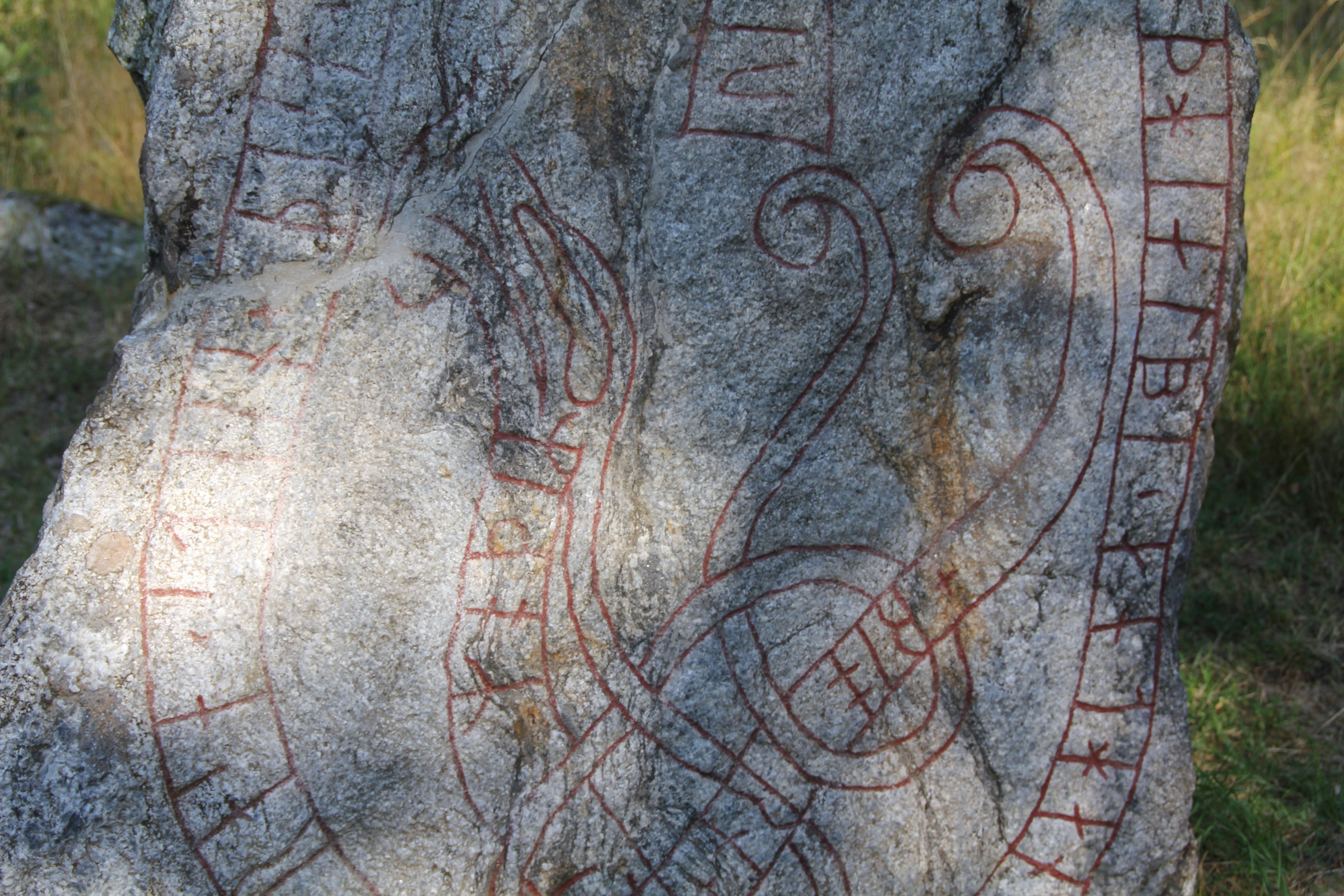 Runstenen U 74 i Husby, Stockholm.